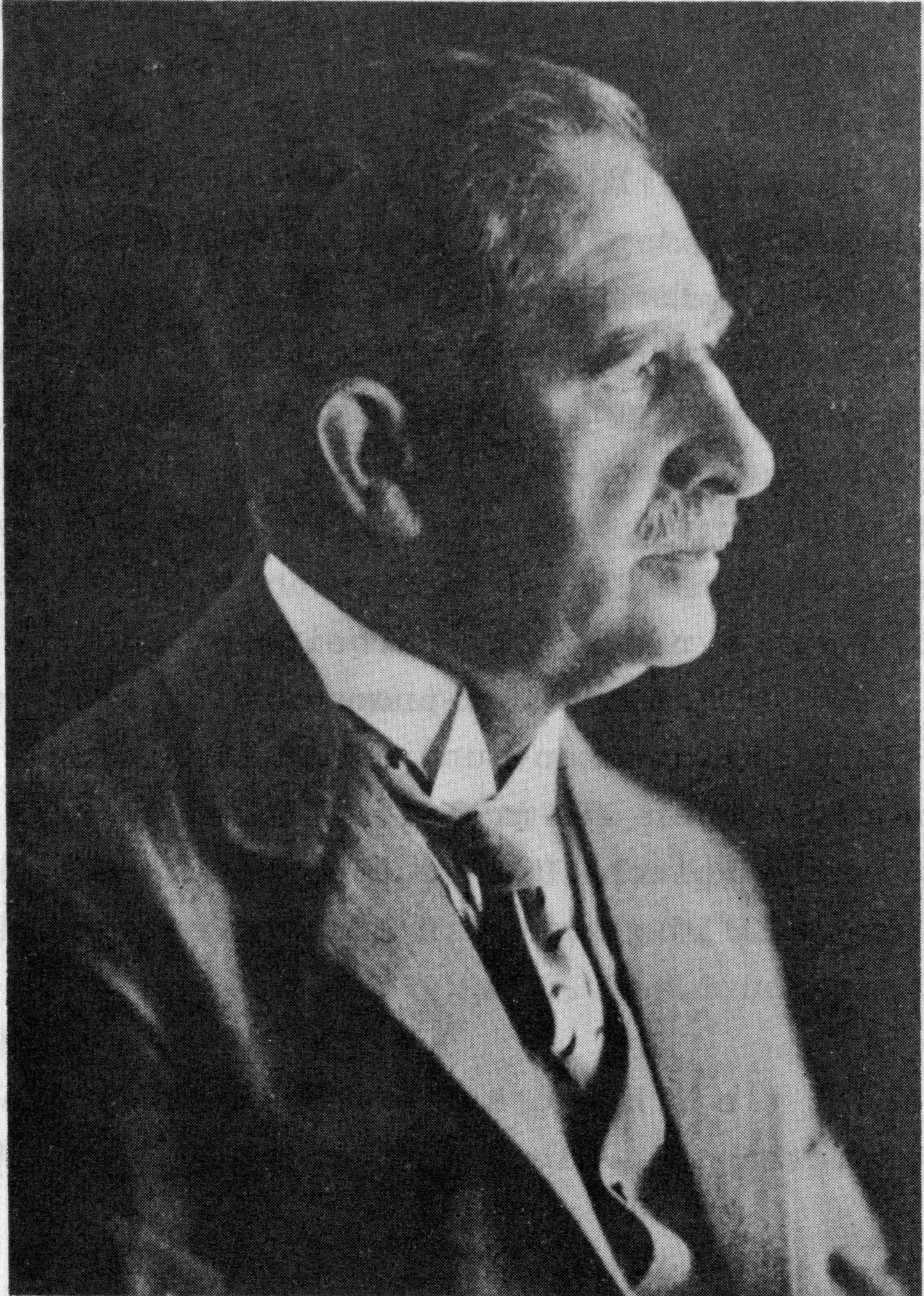 Otto Dimroth (* 28. März 1872 in Bayreuth; † 16. Mai 1940 in Aschaffenburg), als Vorstand des Chemischen Instituts in Würzburg.